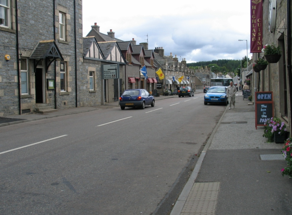 Tomintoul in Schotland - eigen foto